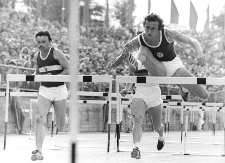 Thomas Munkelt, Becker, Thomas Dittrich ADN-ZB Kluge 2.7.77 Dresden: DDR-Leichtathletik-Meisterschaften-Mit der europäischen Jahresbestzeit von 13,48 s holte sich der Olympiafünfte Thomas Munkelt (r) vom SC DHFK auch den Meistertitel über 110 m Hürden. Den zweiten Platz belegte Becker vom SC Magdeburg. Platz drei belegte Thomas Dittrich (l) , vom SC Karl-Marx-Stadt) .